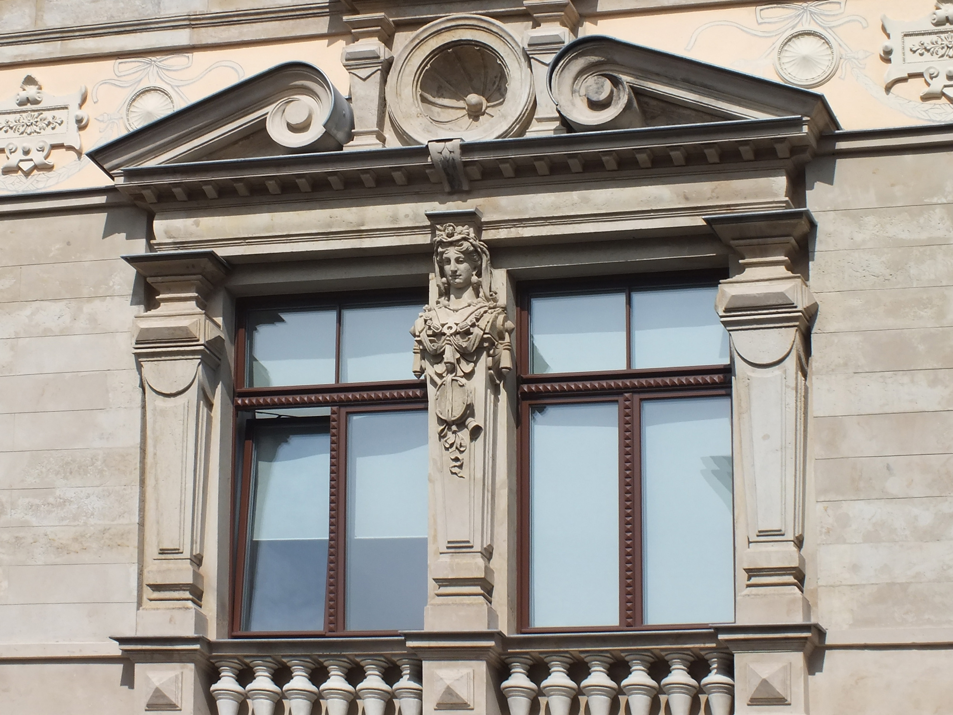 Detail an der restaurierten Villa Schröder in Leipzig, Goldschmidtstraße 31